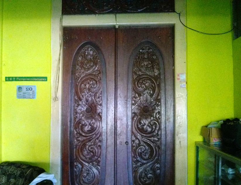 Rumah Bupati Banyuwangi ke-5, Kanjeng Raden Tumenggung Pringgokusumo. Rumah berusia lebih dari 150 tahun ini terletak di tengah-tengah pemukiman padat di lingkungan dusun Sri Tanjung, Kelurahan Temenggungan, Banyuwangi